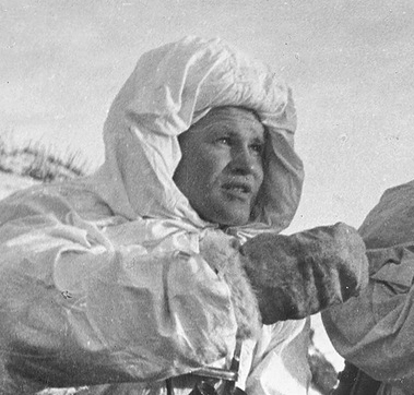 Vasili Záitsev durante la batalla de Stalingrado en diciembre de 1942